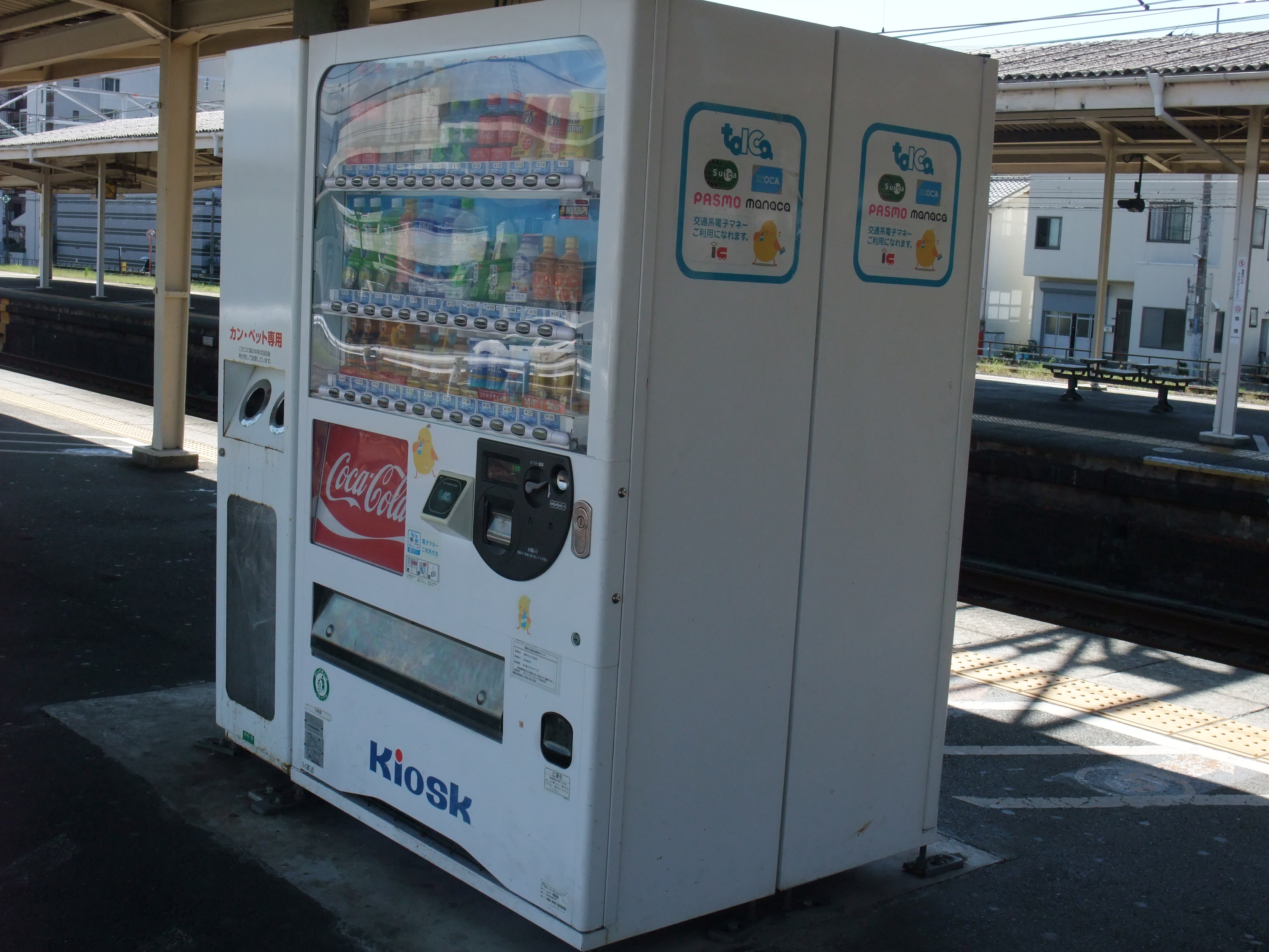 東海道本線三島駅ホームの自動販売機、東海キヨスクが管理運営する（自販機下部にKioskのロゴ入り）